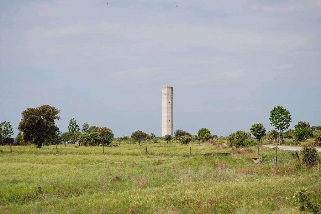 Torreta de elevación de agua para regadío en Saucedilla (prov. de Cáceres)